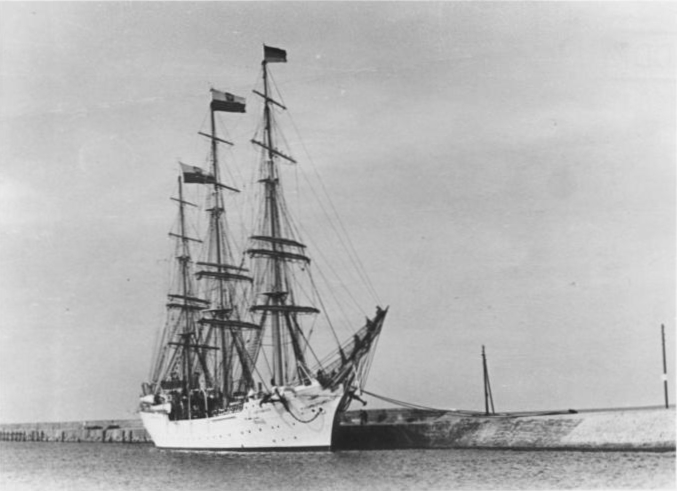 Polnisches Segelschulschiff "Dar Pomorza" Zentralbild Pietsch 24.5.1952 Freundschaftsbesuch in Warnemünde. Zu einem Freundschaftsbesuch ist am 23.5.196´52 im Warnemünder Hafen das polnische Schulschiff "Dar Pomorza" eingelaufen. An den Molen grüssten zahlreiche Werktätige, Mitglieder der FDJ und Junge Pioniere das Schiff, als es die Hafeneinfahrt passierte und anlegte. Nach 4 tägigem Aufenthalt setzte das Segelschulschiff seine Weltreise mit Kurs auf Kopenhagen fort. UBz: Das Schiff an der Mole in Warnemünde.